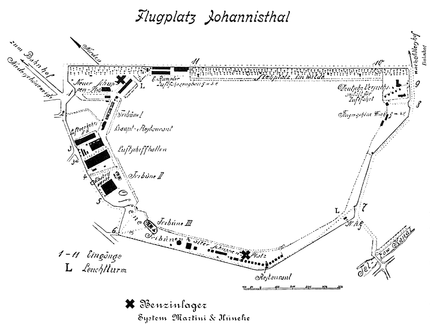 Lageplan des Flugplatzes Johannisthal von 1913. Der Plan entspricht im wesentlichen einem Plan des Platzes aus dem Buch: Albert Rupp, Willy Rosenstein: Die Fliegerschule. Ein Lehrbuch für den Flugschüler. Volckmann, Berlin 1913, S. 31